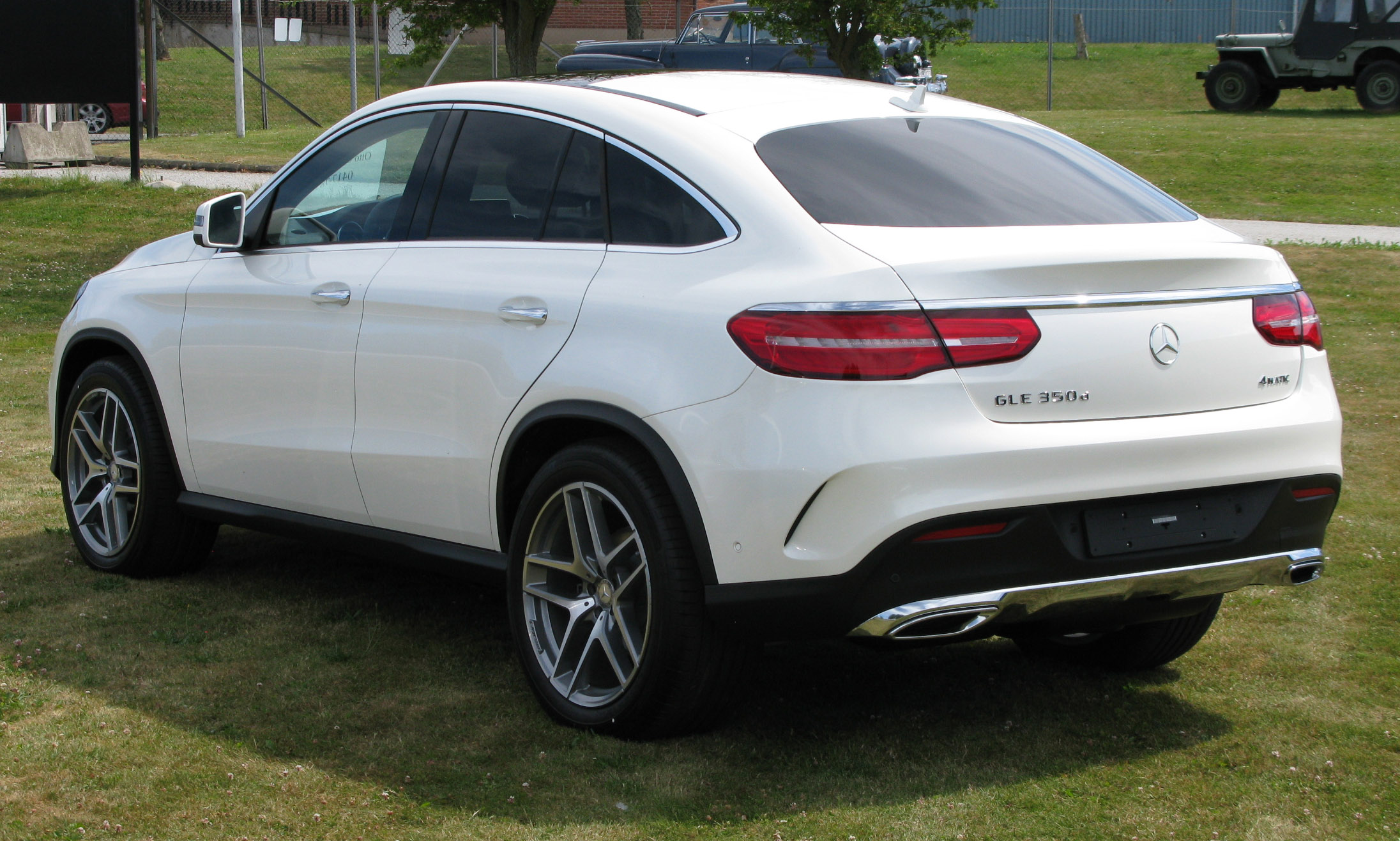 Mercedes-Benz GLE350d Coupé